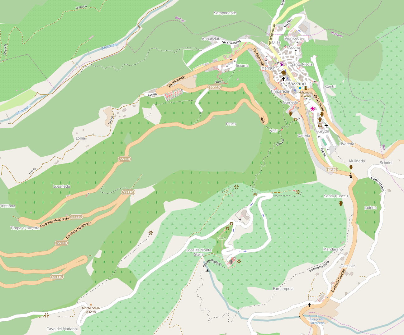 Pazzano su open street map mag 2015 comprensorio